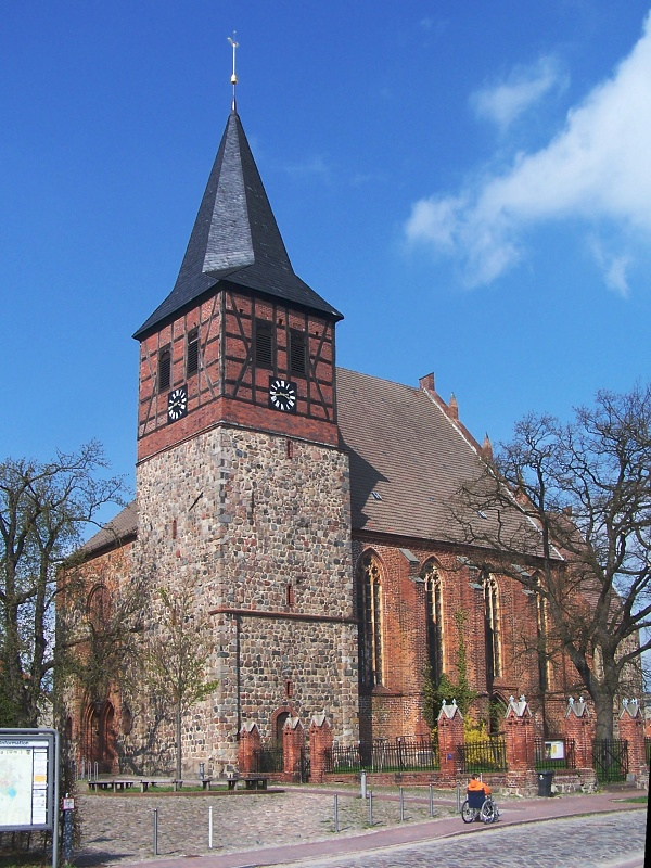 Kirche in Strasburg (Uckermark)